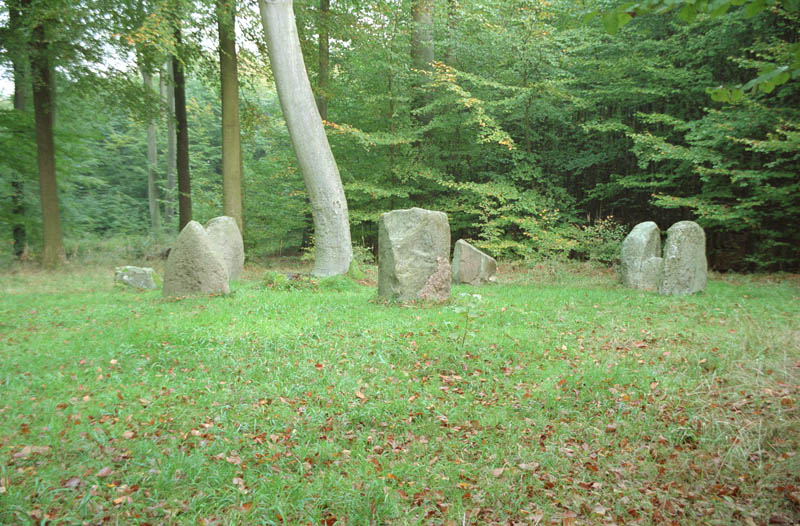 Kleiner Kreis des Boitiner_Steintanzes.